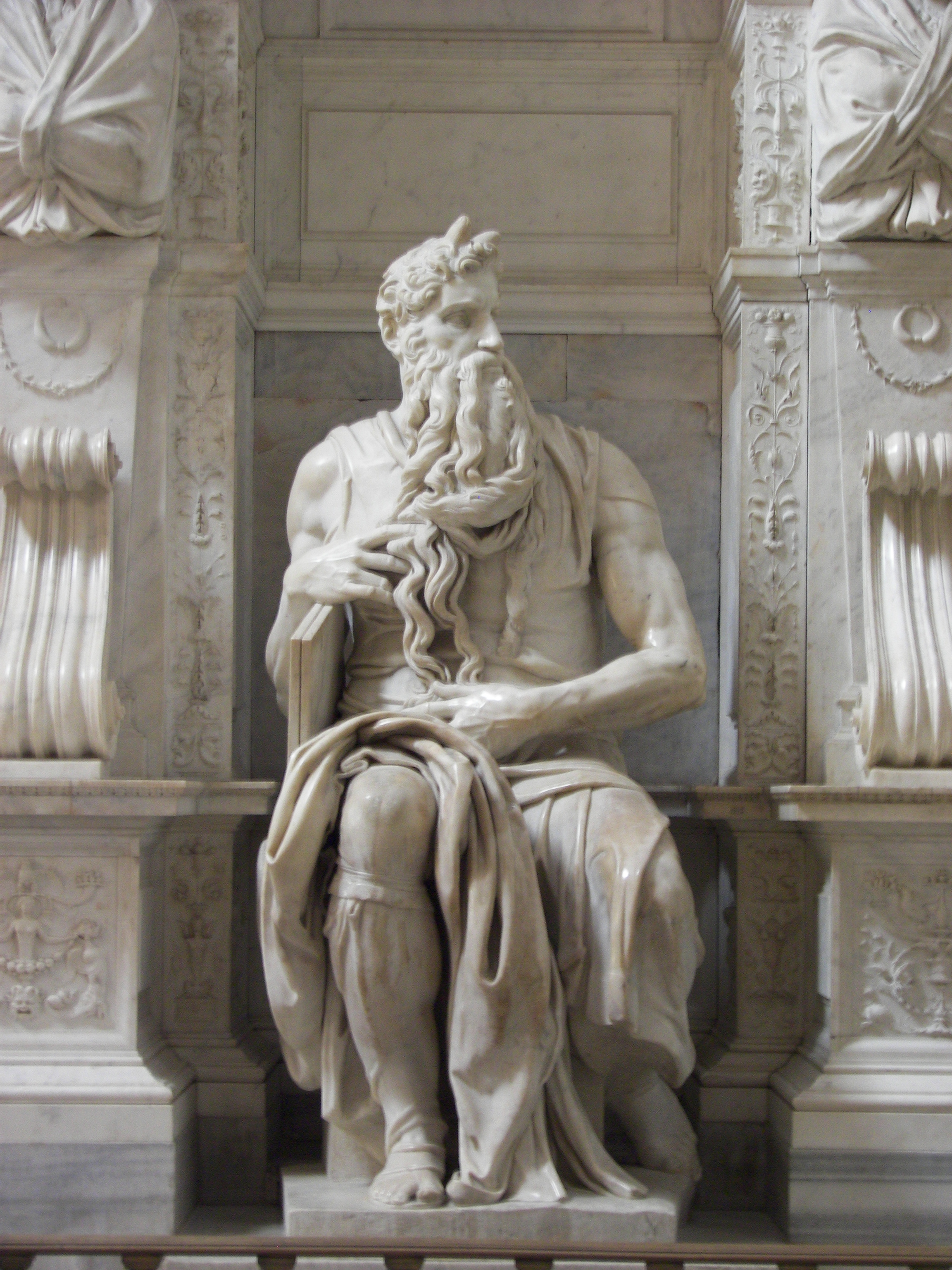 Michelangelo's Moses in San Pietro in Vincoli in Rome.